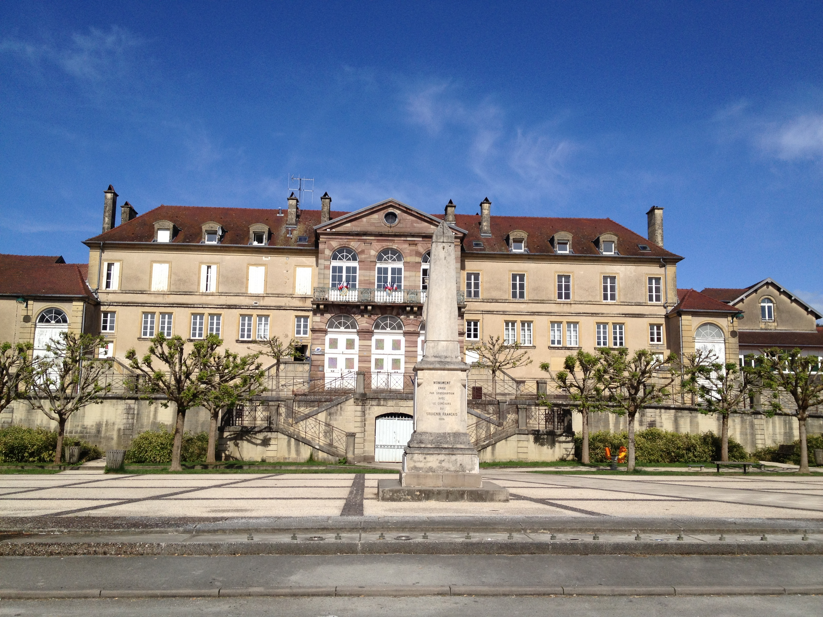 Mairie de Breurey-lès-Faverney et monument aux morts